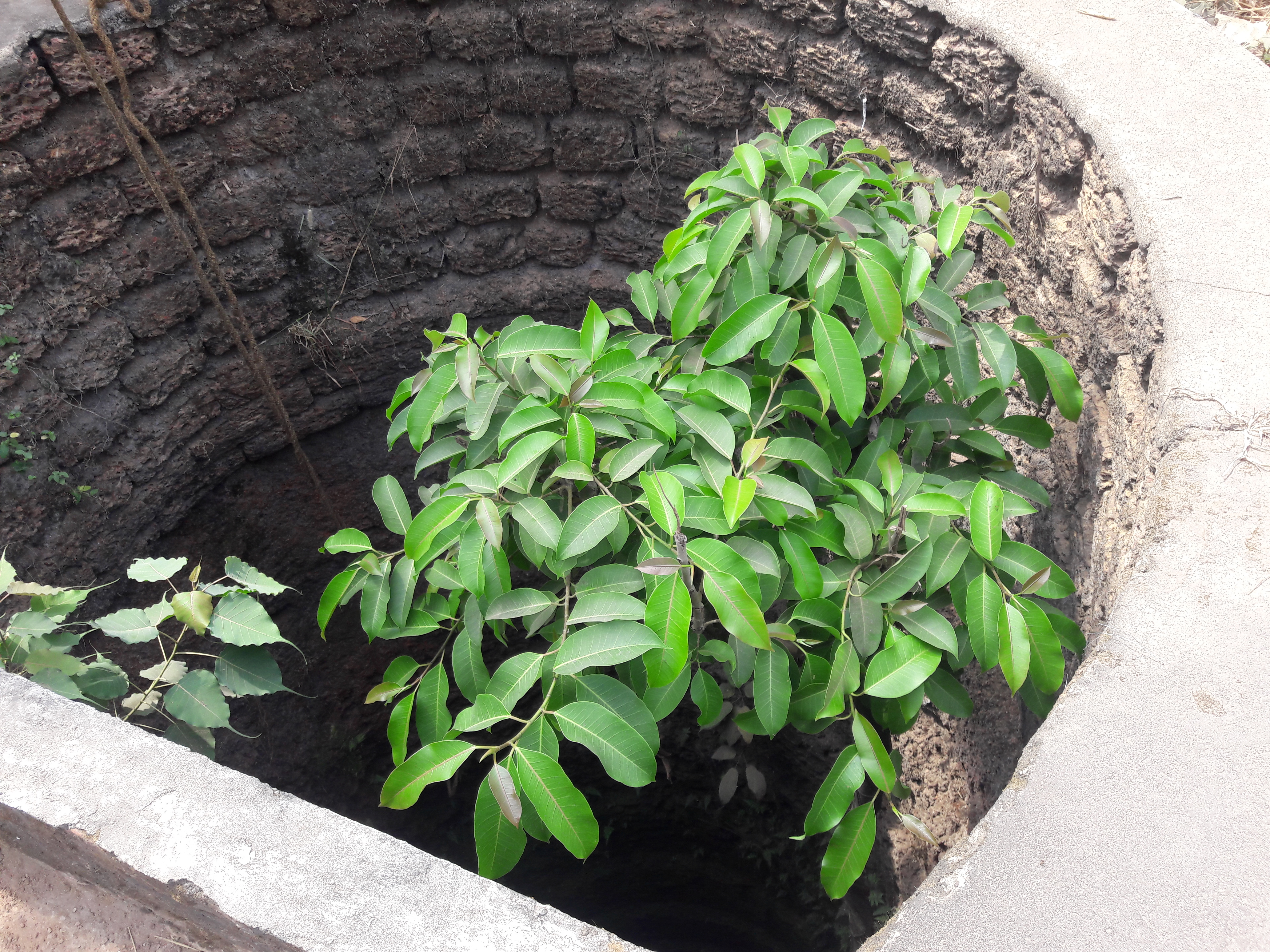 കിണറിനകത്തൊരു കൊയലി മരം അഥവാ ചേല മരം.ndian bat tree / Indian bat fig ശാസ്ത്രീയ നാമം Ficus amplissima കുടുംബം Moraceae.